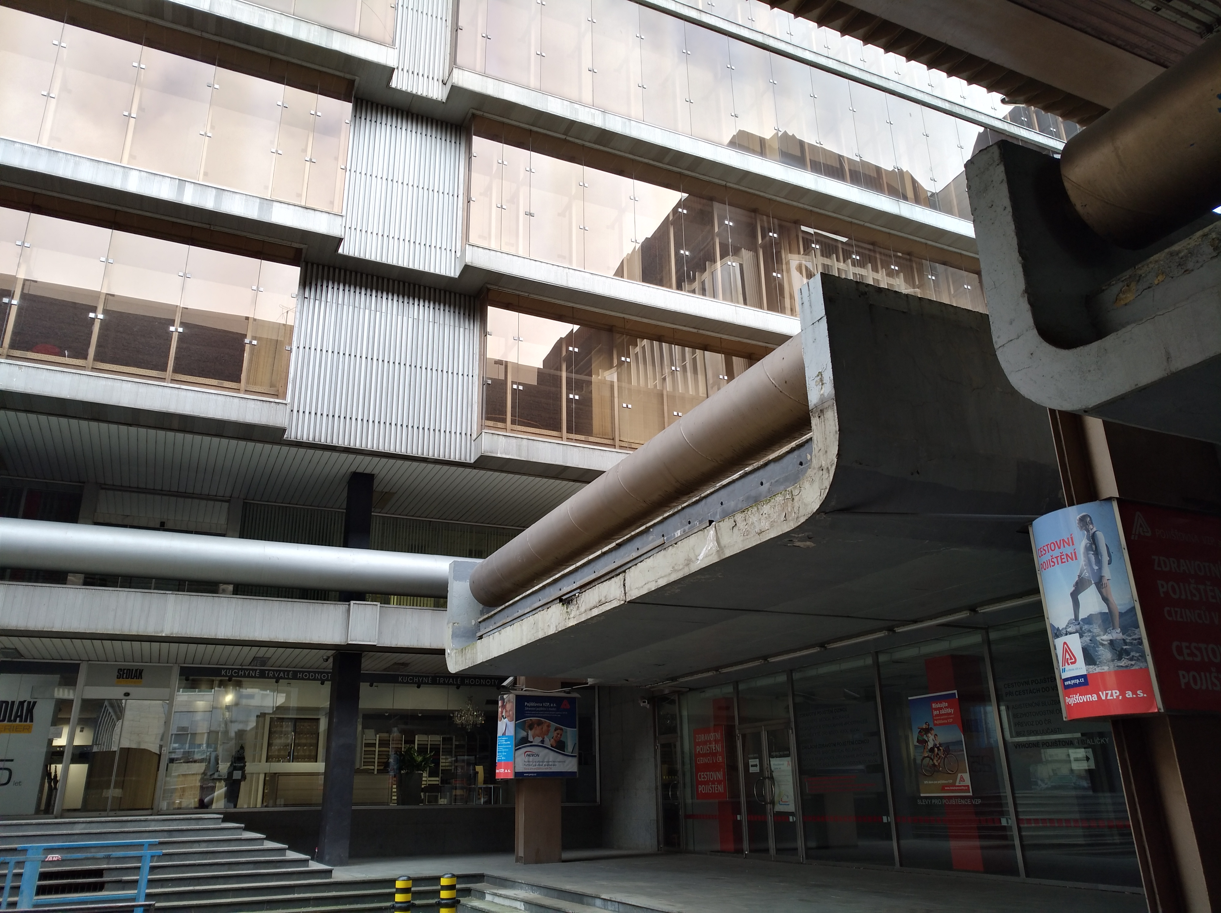 Transgas, pohled k sídlu řídící ústředny